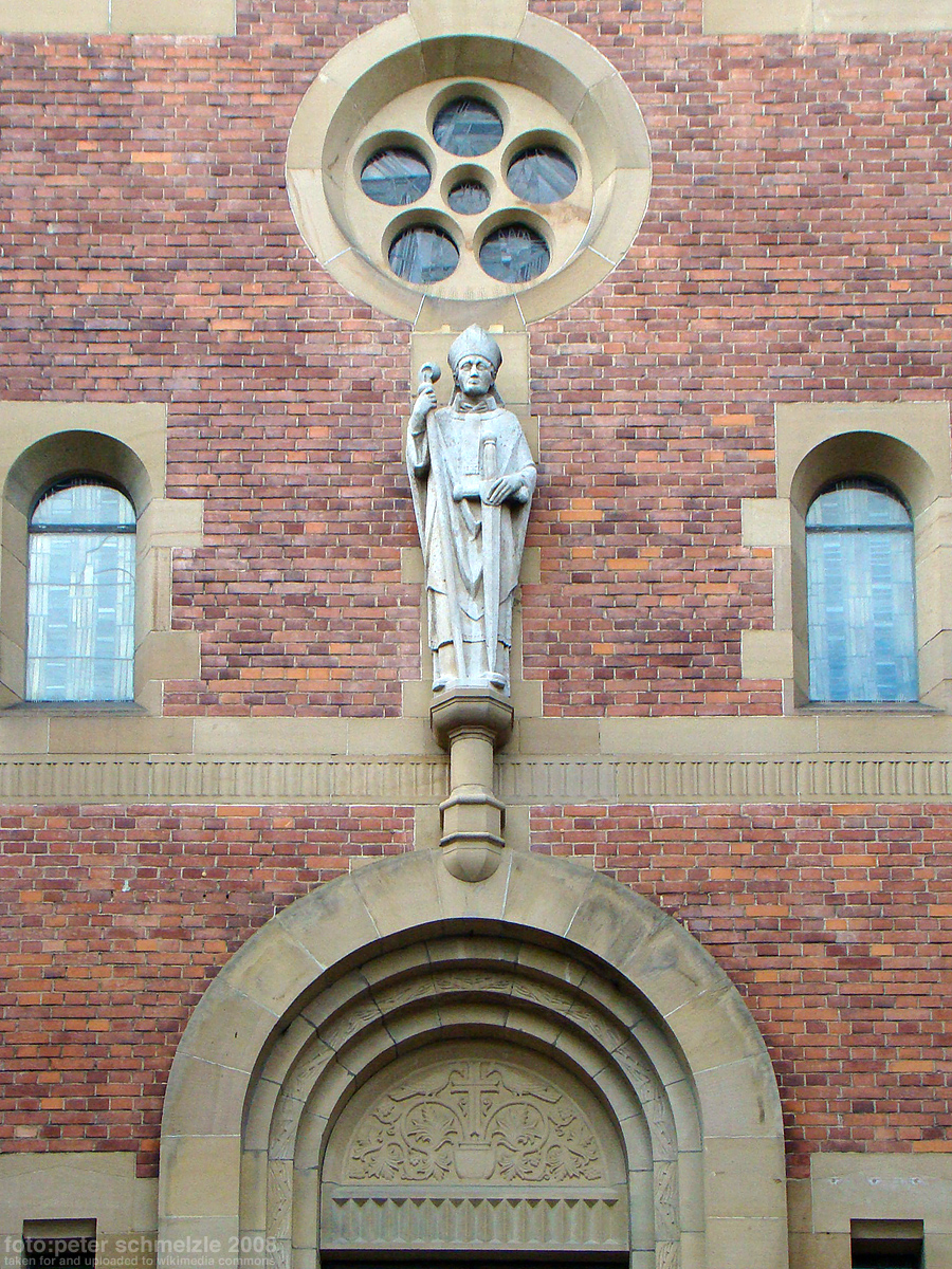 Portal der katholischen Kilianskirche in Heilbronn-Böckingen